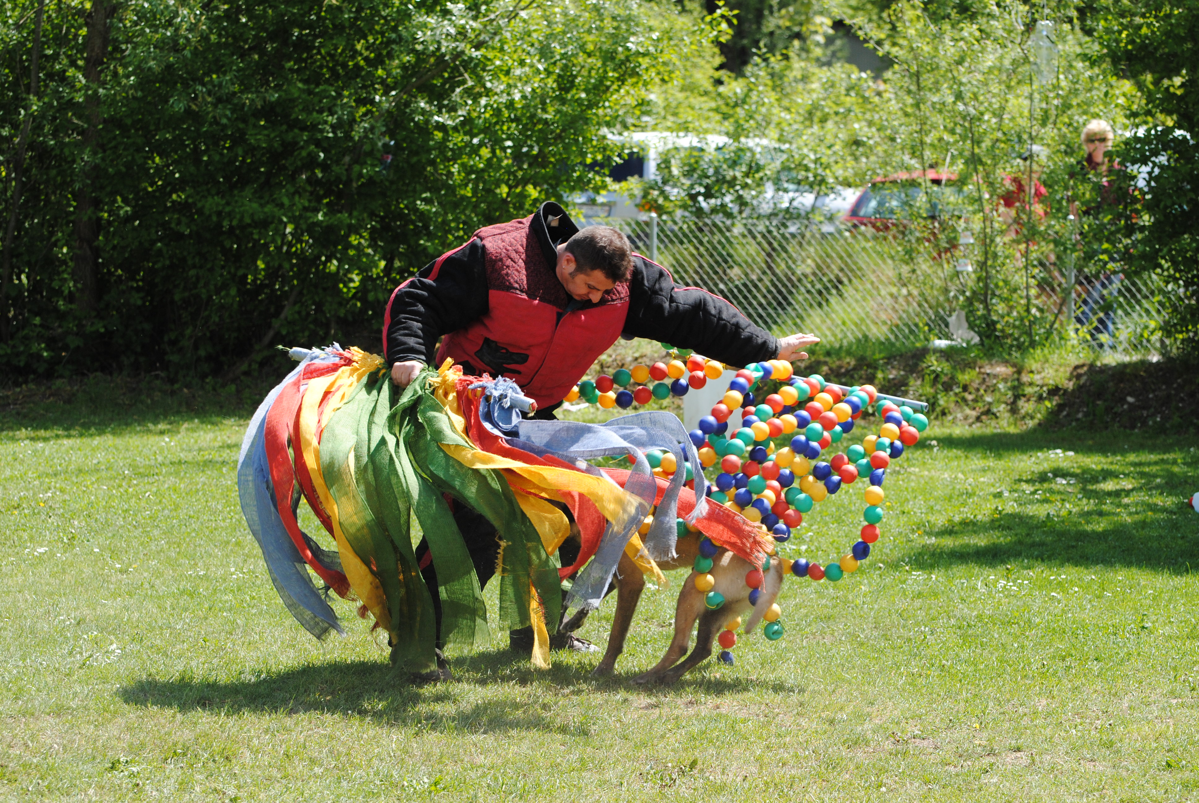 Face artifice Orpung